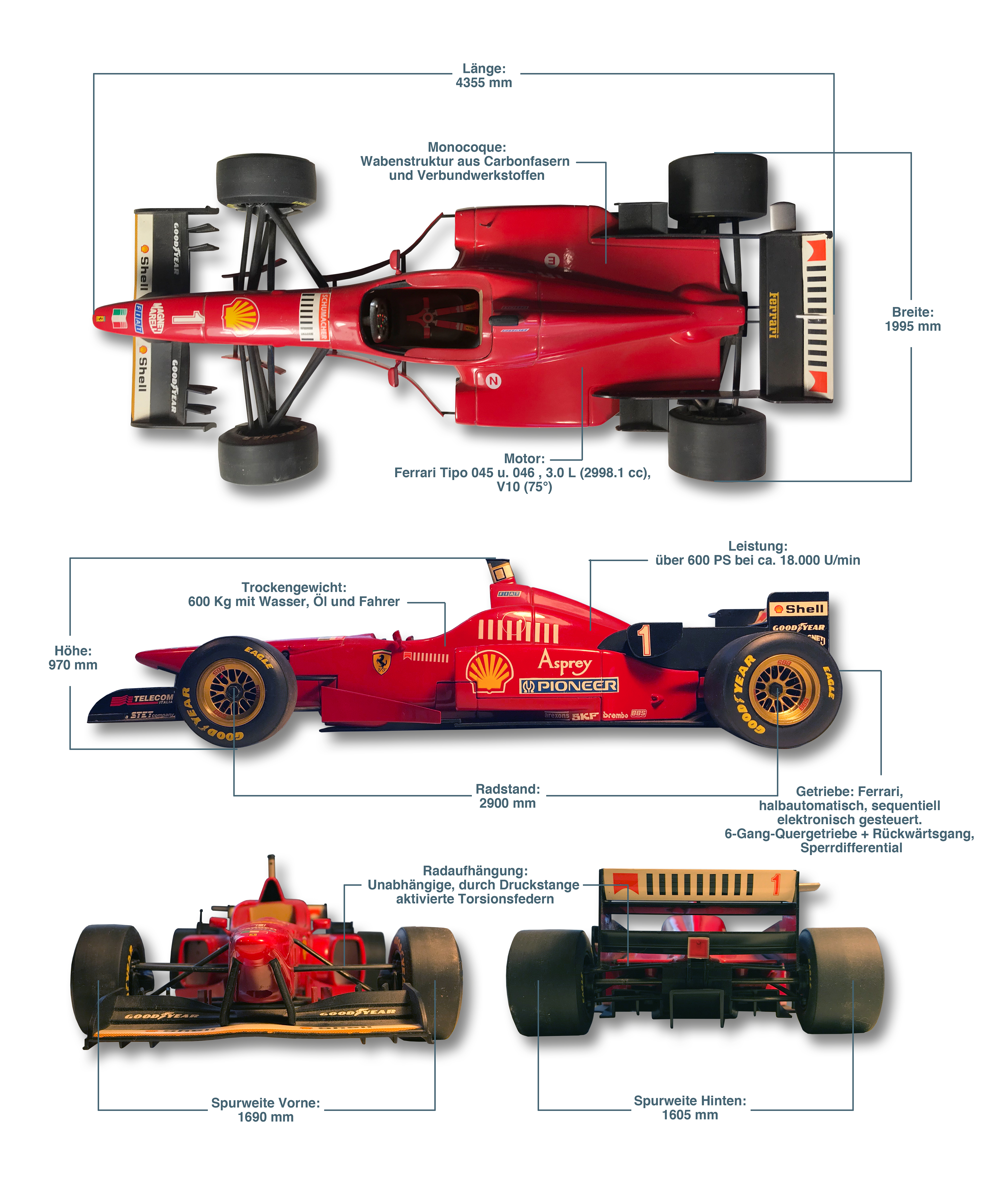 Grafisch aufbereitete Basis-Informationen zum Ferrari F310 (1996) anhand eines 1:18 Scale-Modells